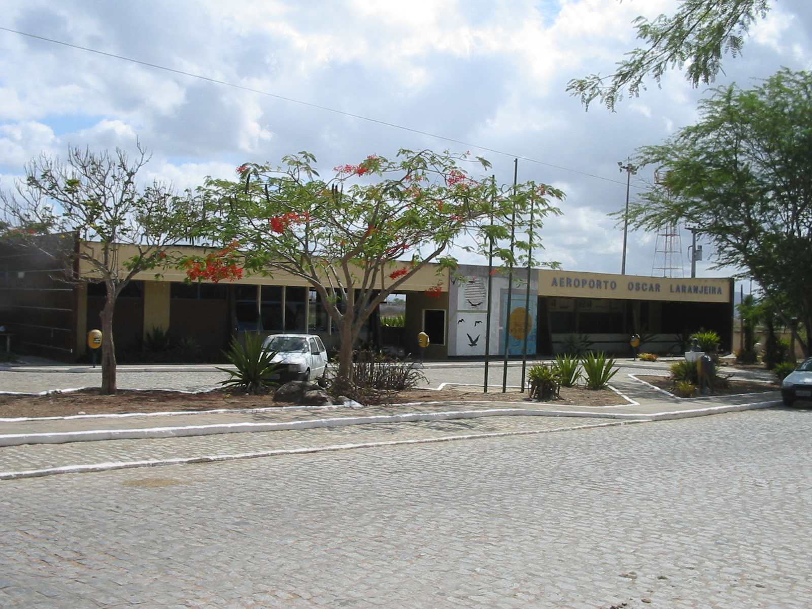 Caruaru (Pernambuco), Brasil. Aeroporto Oscar Laranjeira. Caruaru (Pernambuco), Brazil. Airport.